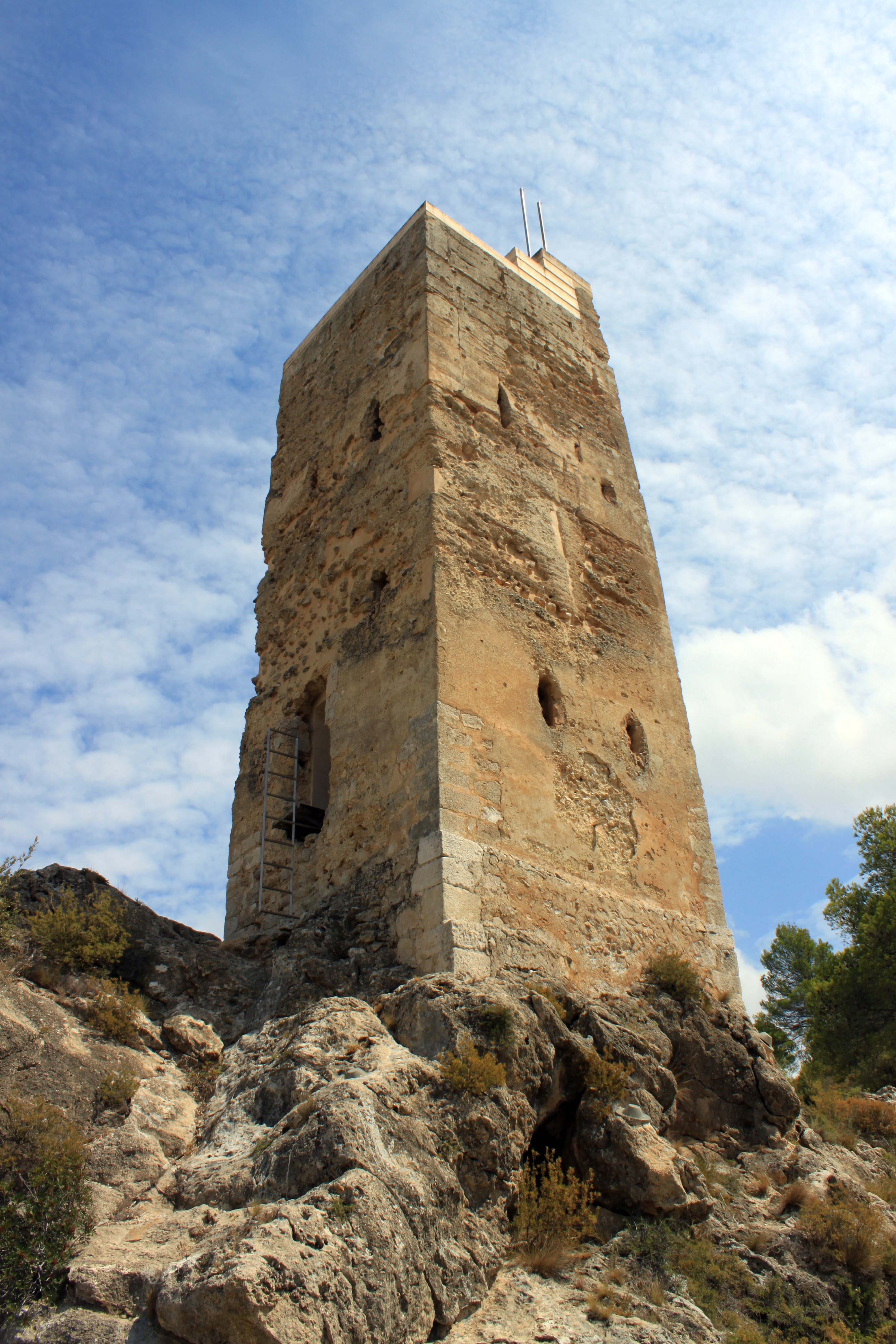 Torre albarrana de Coloms, también llamada Torre Mora, de la localidad de Moixent, provincia de Valencia, Comunidad Valenciana, España.